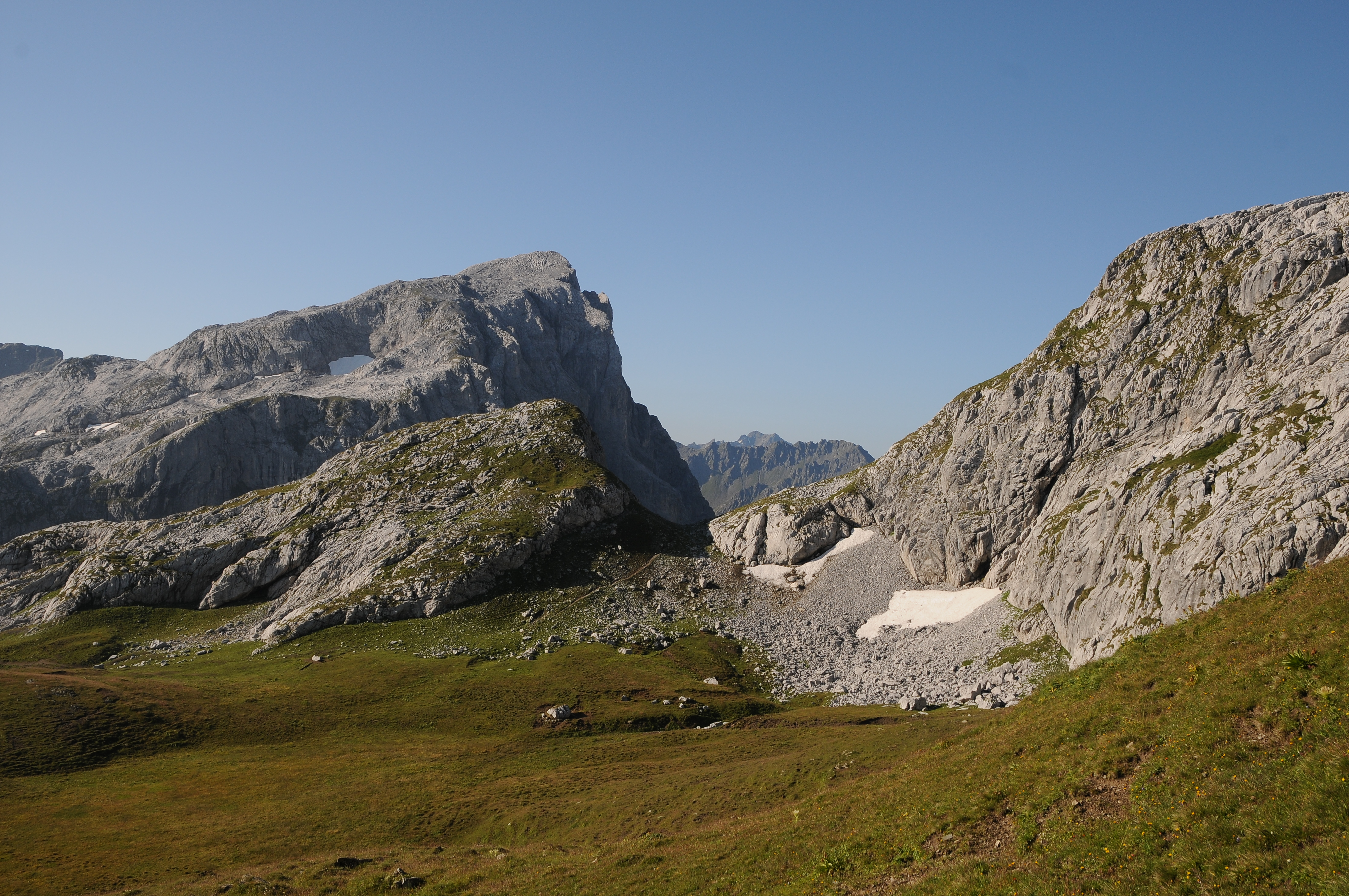 Die Weißplatte, auch genannt Wiss Platte, ist ein nach österreichischen Angaben 2.630 m, nach schweizerischen 2.628 m hoher Berg im Rätikon, einer Gebirgsgruppe der westlichen Zentralalpen. Der Gipfel liegt genau auf der Staatsgrenze zwischen dem österreichischen Bundesland Vorarlberg und dem Schweizer Kanton Graubünden. Die Weißplatte gehört zur Sulzfluhgruppe.